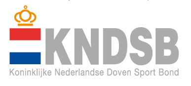 logo KNDSB